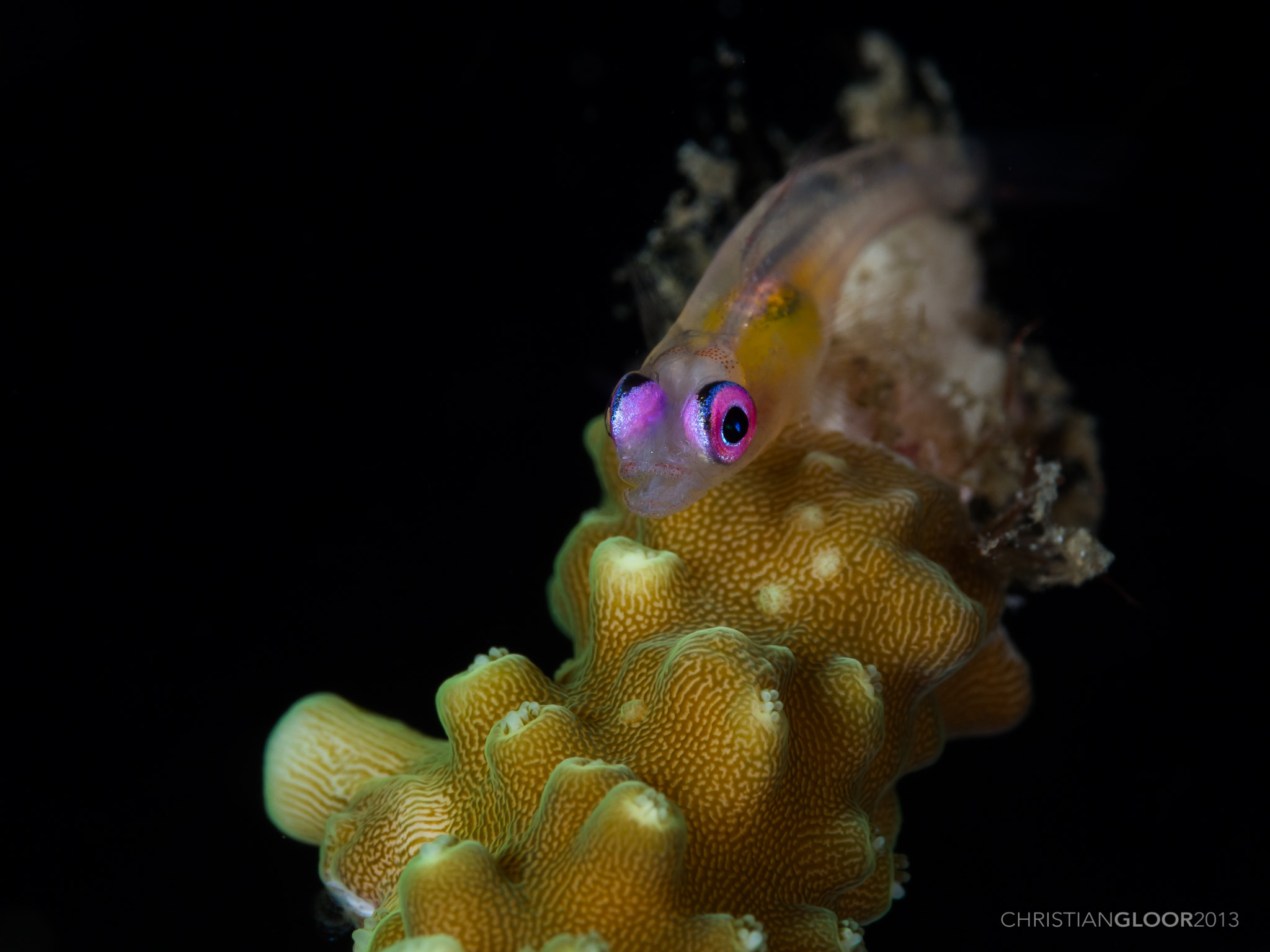 Pinkeye Goby / Bryaninops natans About 2cm